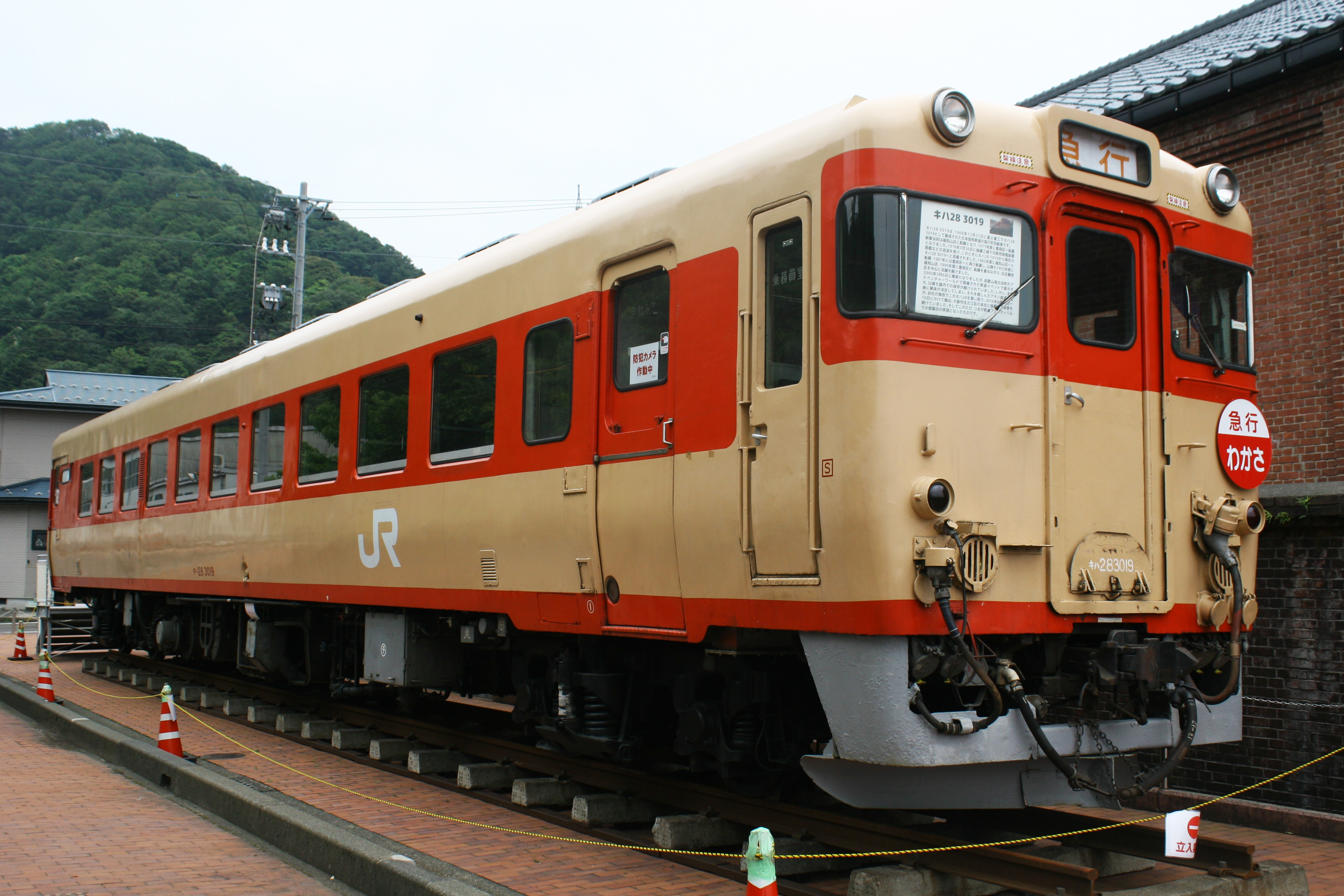 敦賀港に保存されているキハ28 3019